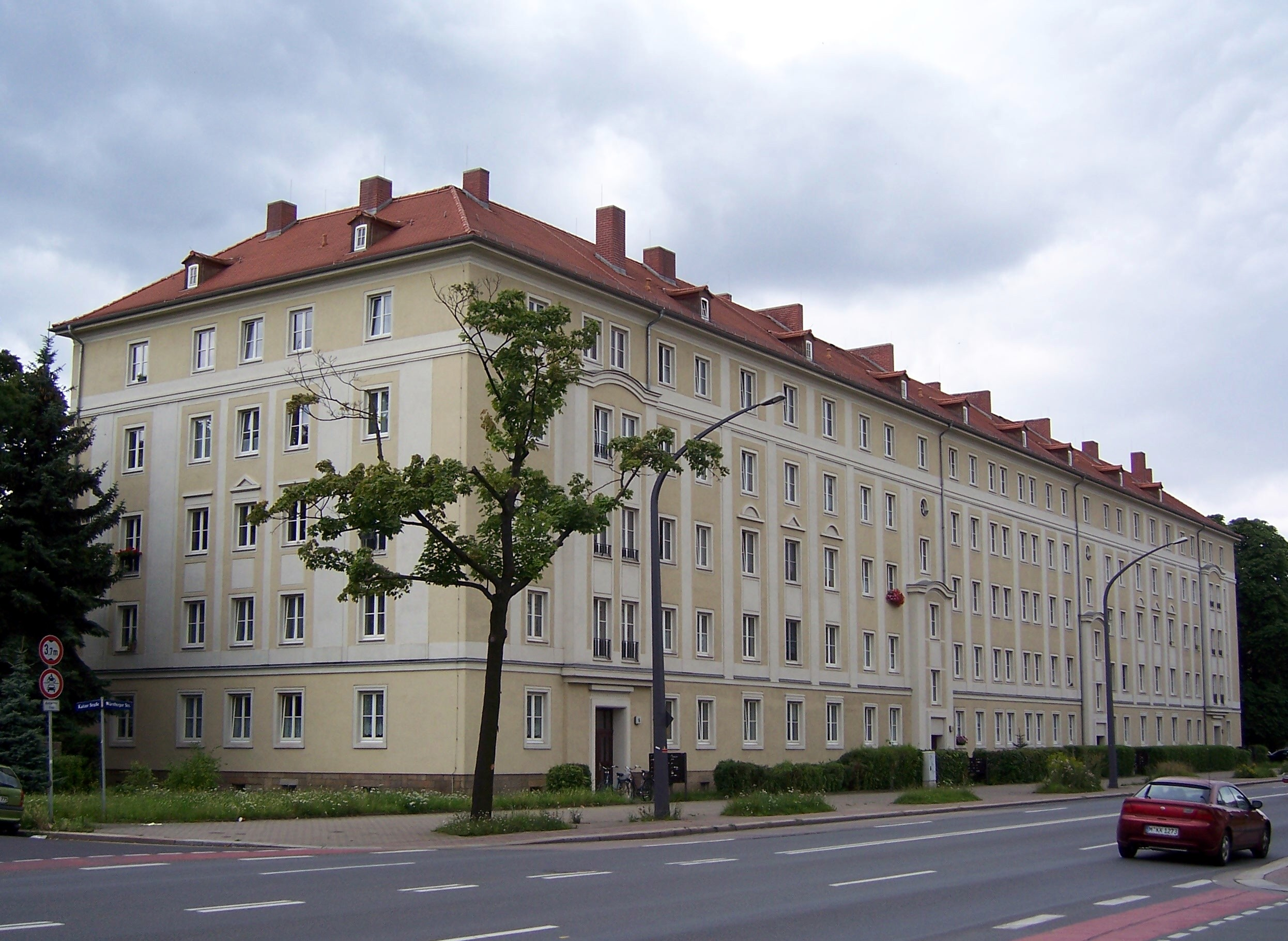 Ein Haus des Gebäudekomplexes Nürnberger Straße in der Dresdner Südvorstadt.